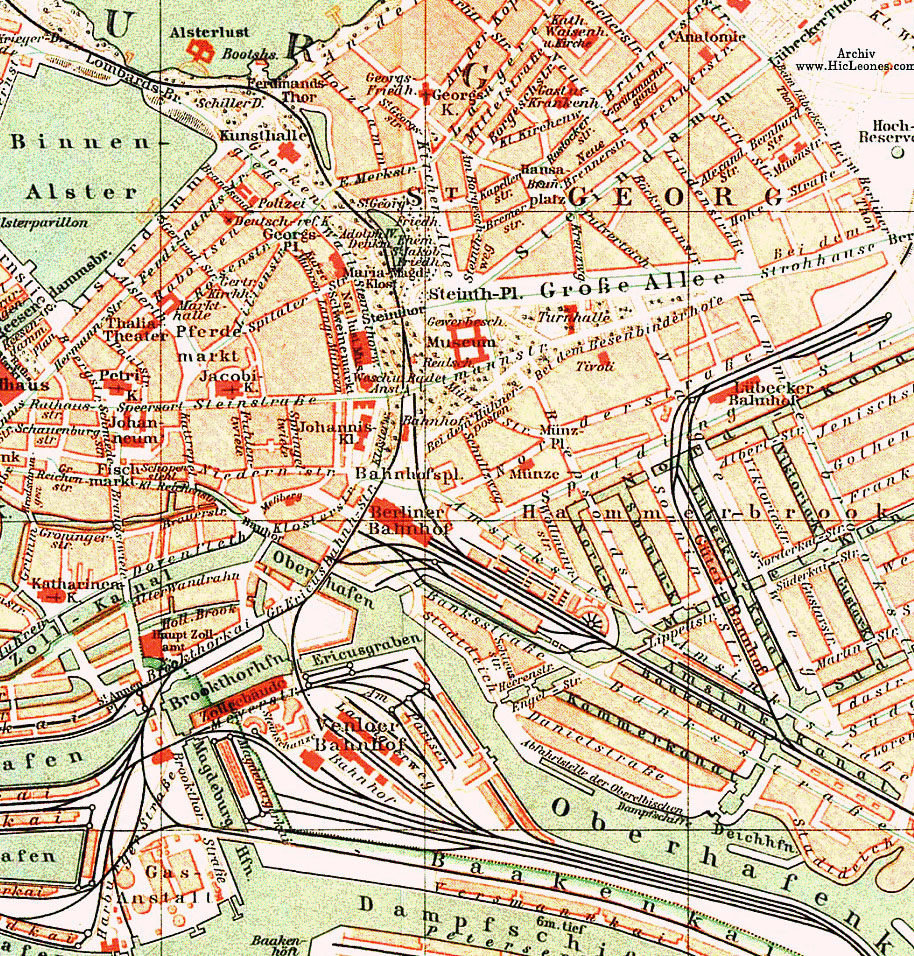 Lage der Bahnhöfe in Hamburg um 1890